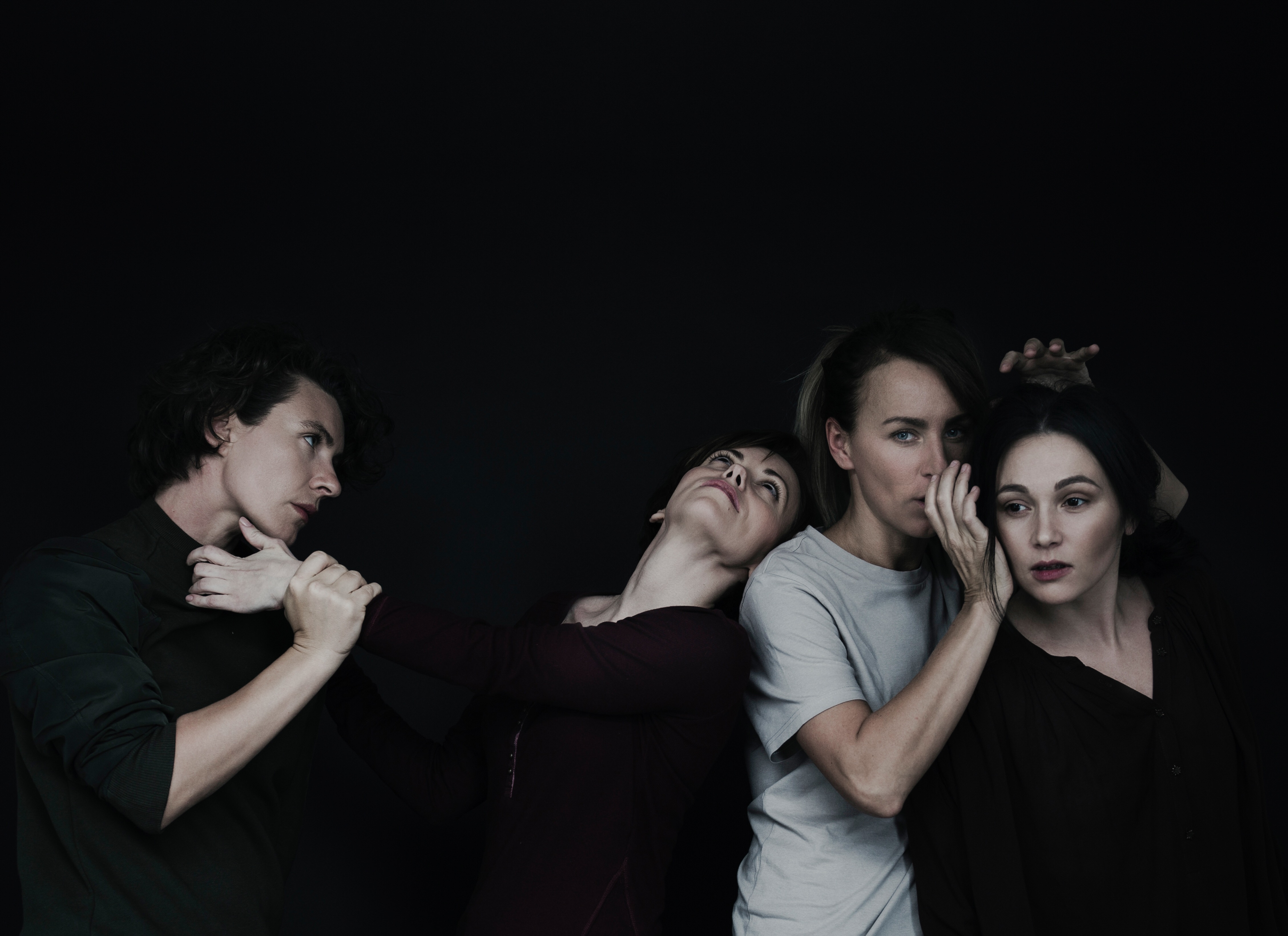 фото: Вера Пацева